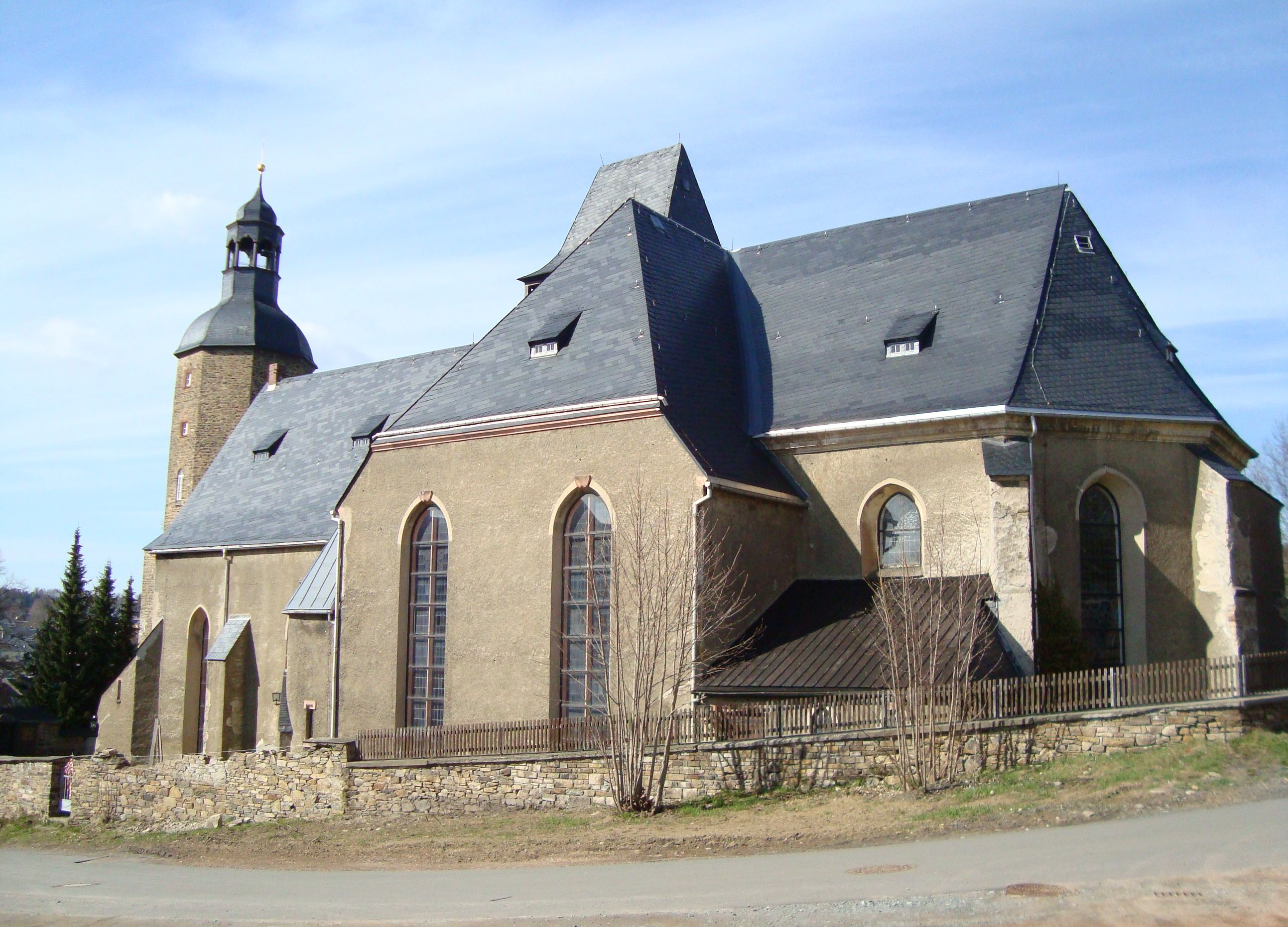 St. Laurentiuskirche in Geyer im Erzgebirge